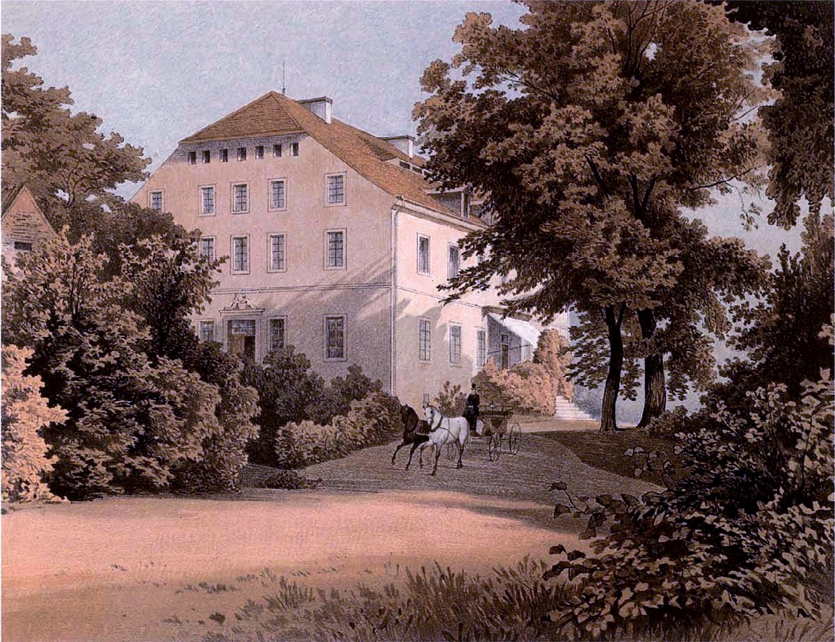 Rittergut in Arnsdorf bei Reichenbach/O.L., Kreis Görlitz, Provinz Schlesien